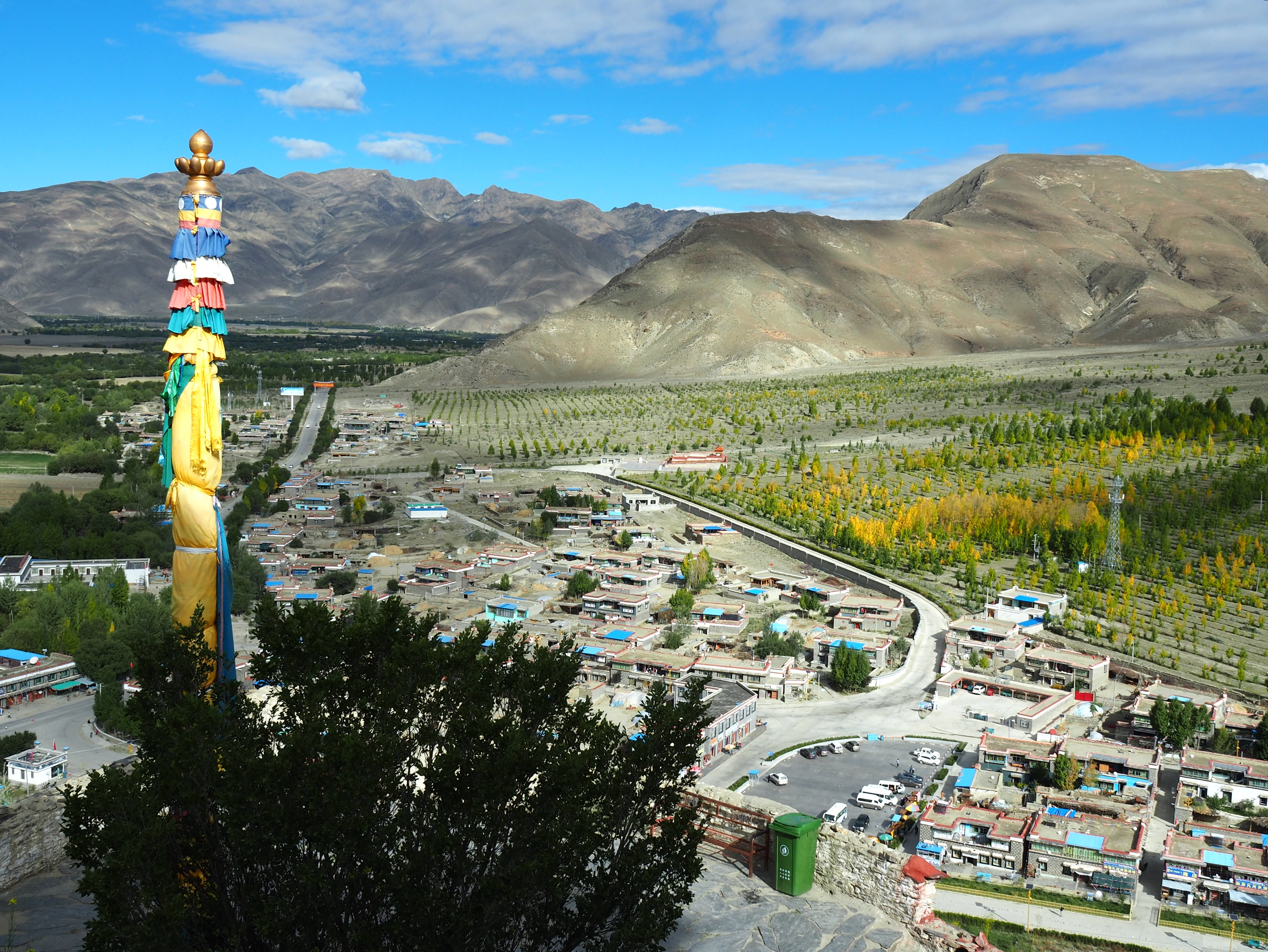 Yumbulagang